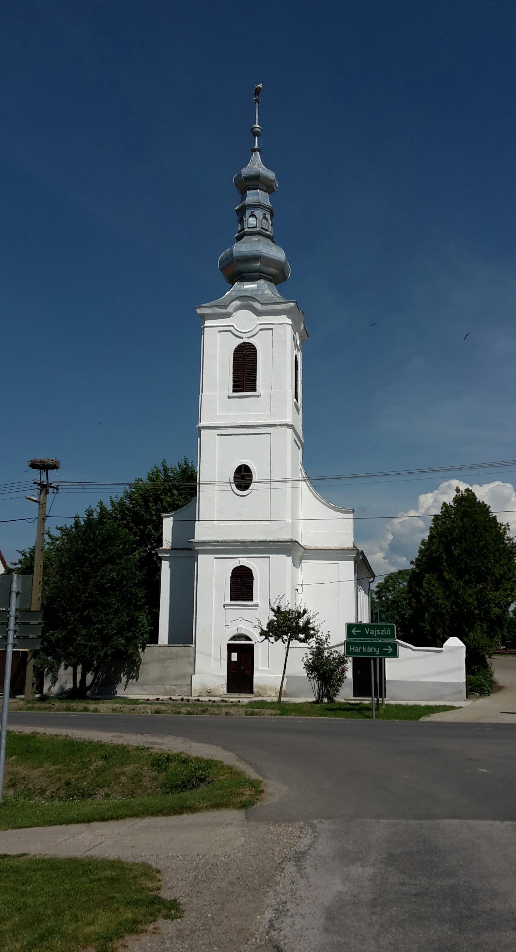 A kémesi református templom 1800-ban épült.